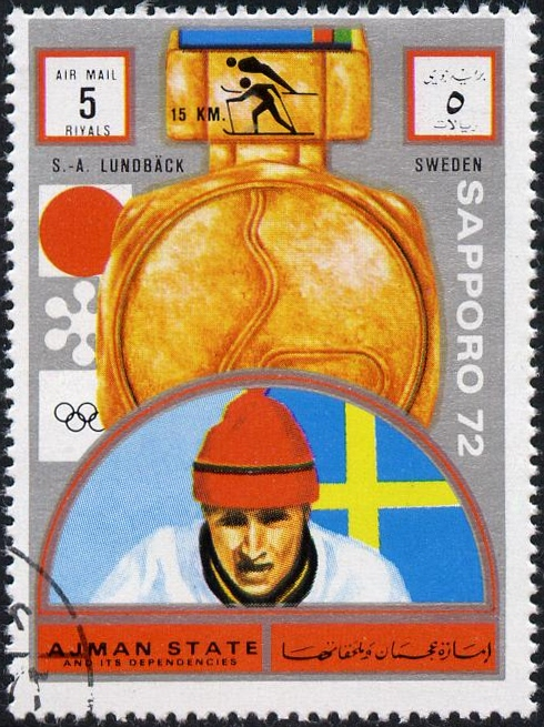 Sven-Åke Lundbäck